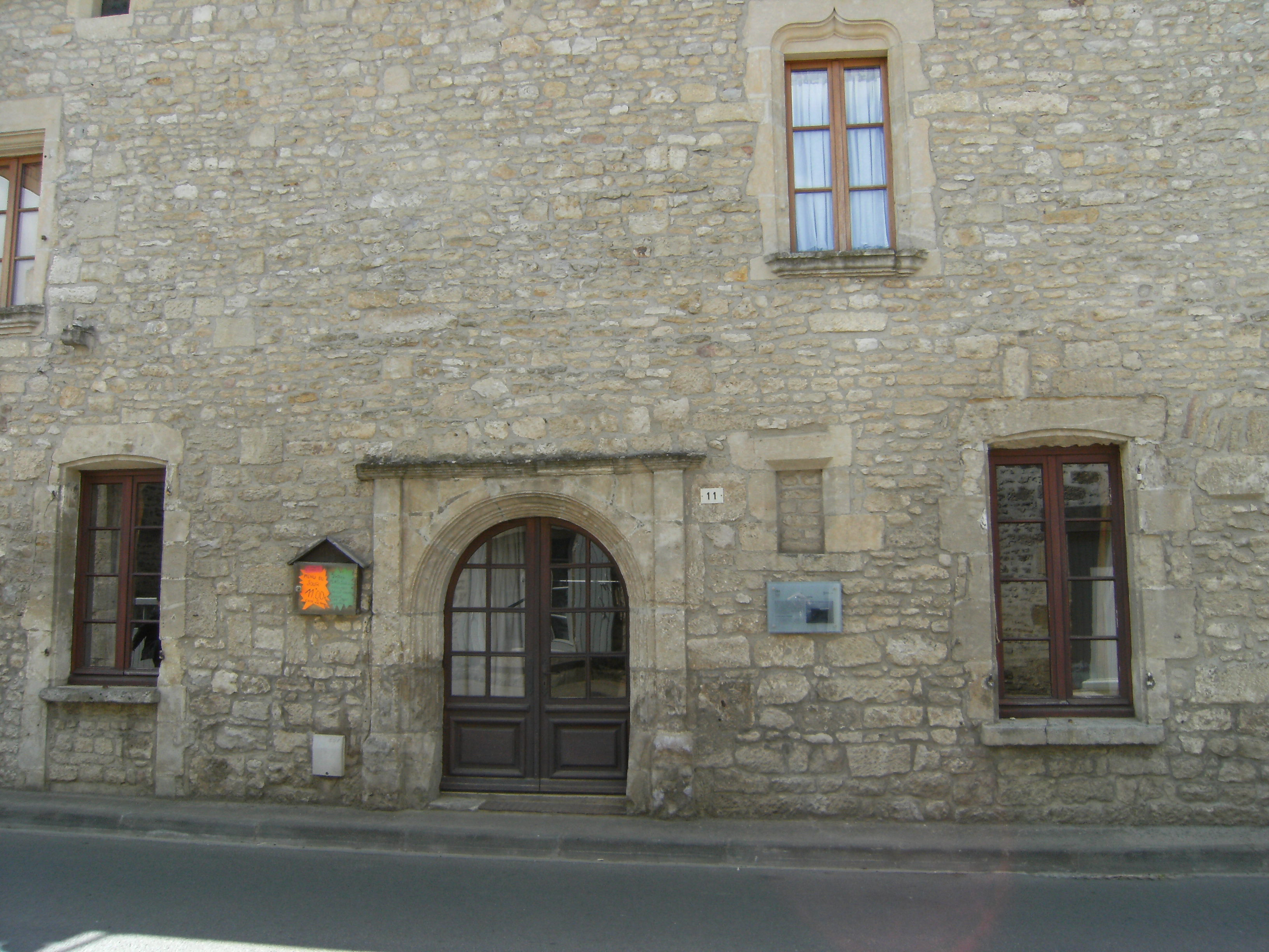 Auberge Ste Catherine à Foussais-Payré